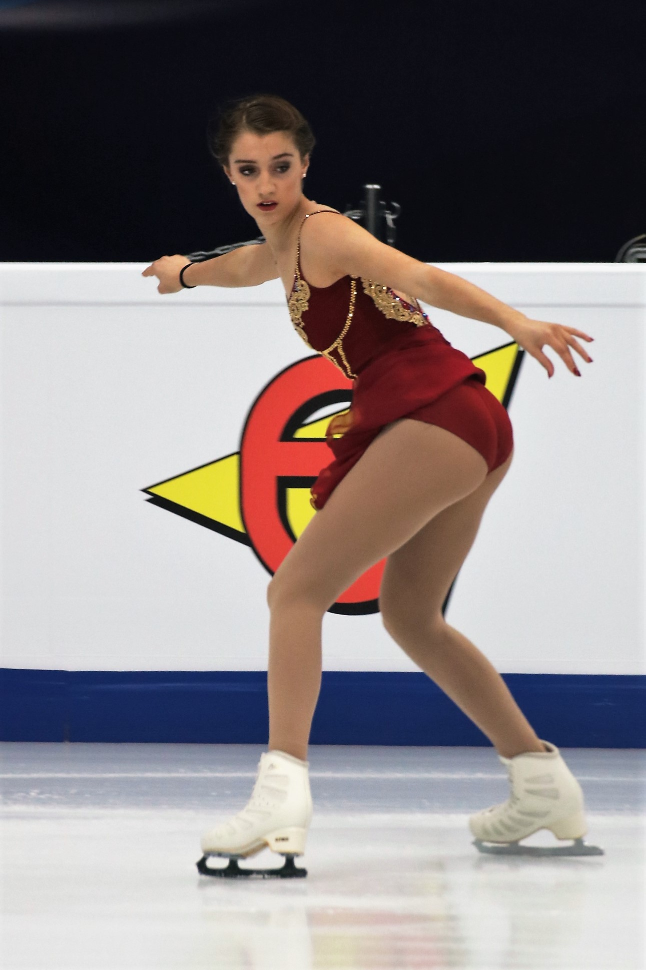 Алексия Паганини (Швейцария) на Чемпионате Европы по фигурному катанию 2018.